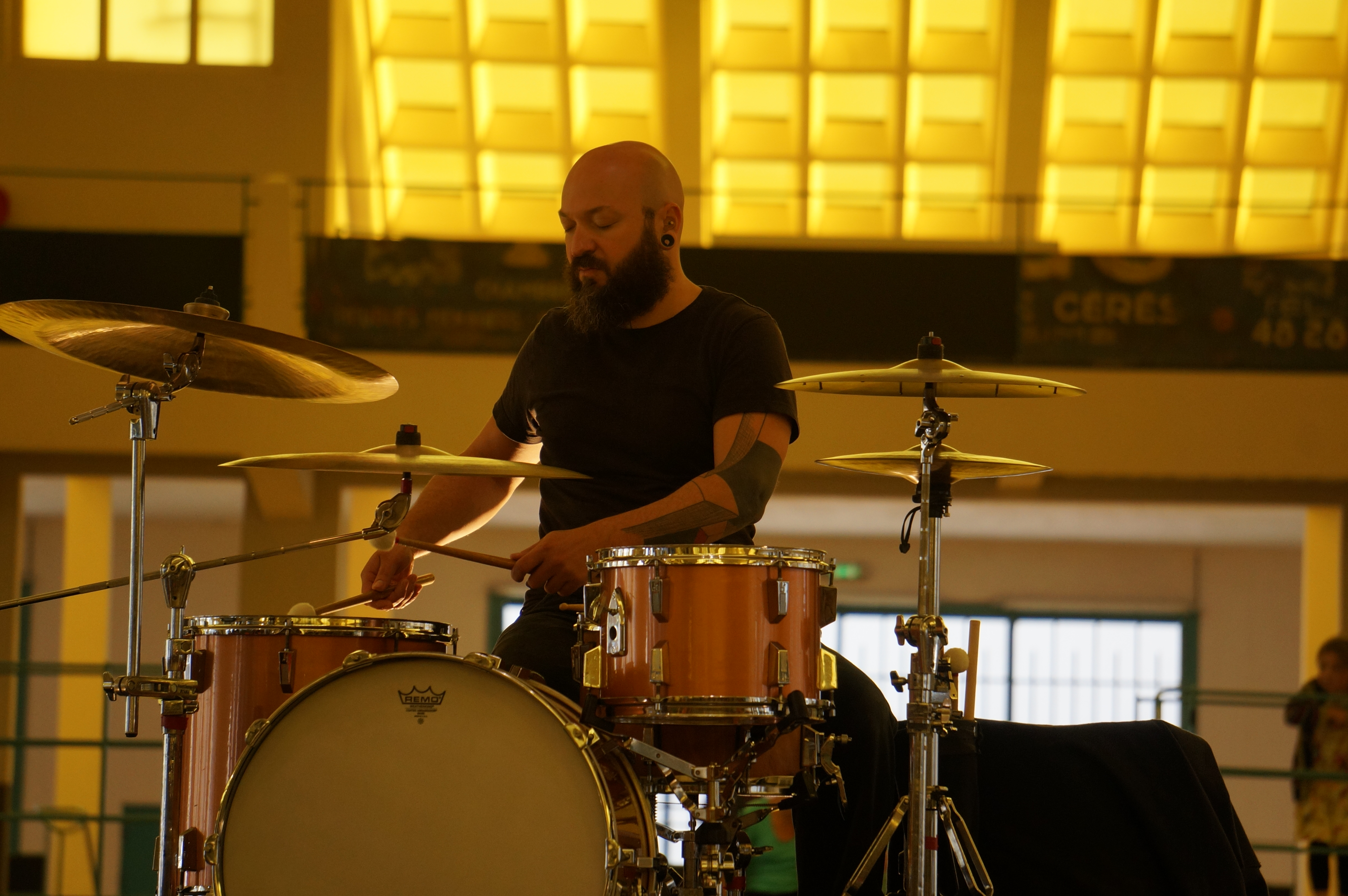 Jason Van Gulick jouant aux Halles du Boulingrin (Reims).